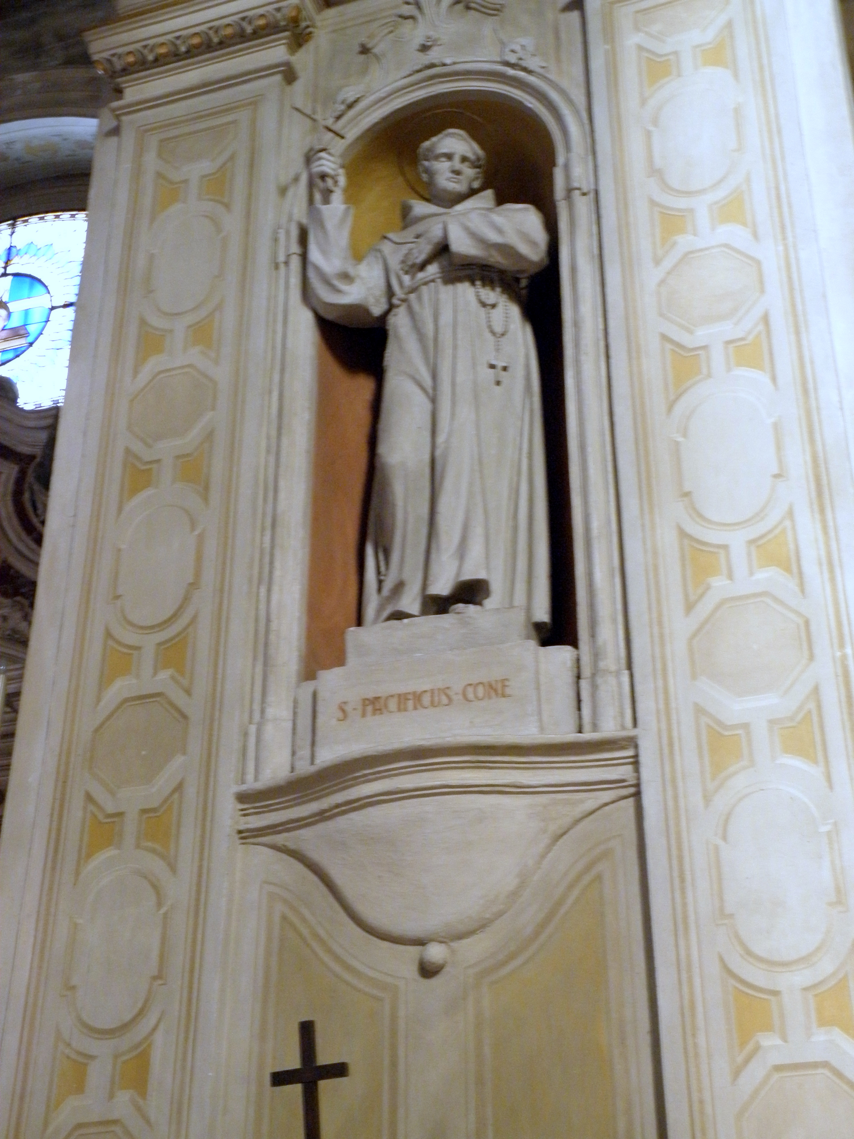 Lendinara, Duomo di Santa Sofia: interno, statua di San Pacifico.